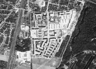 Osiedle Dębina na poznańskim Dębcu sfotografowane przez amerykańskiego satelitę wywiadowczego KH-4A 1023, 23 sierpnia 1965 r.